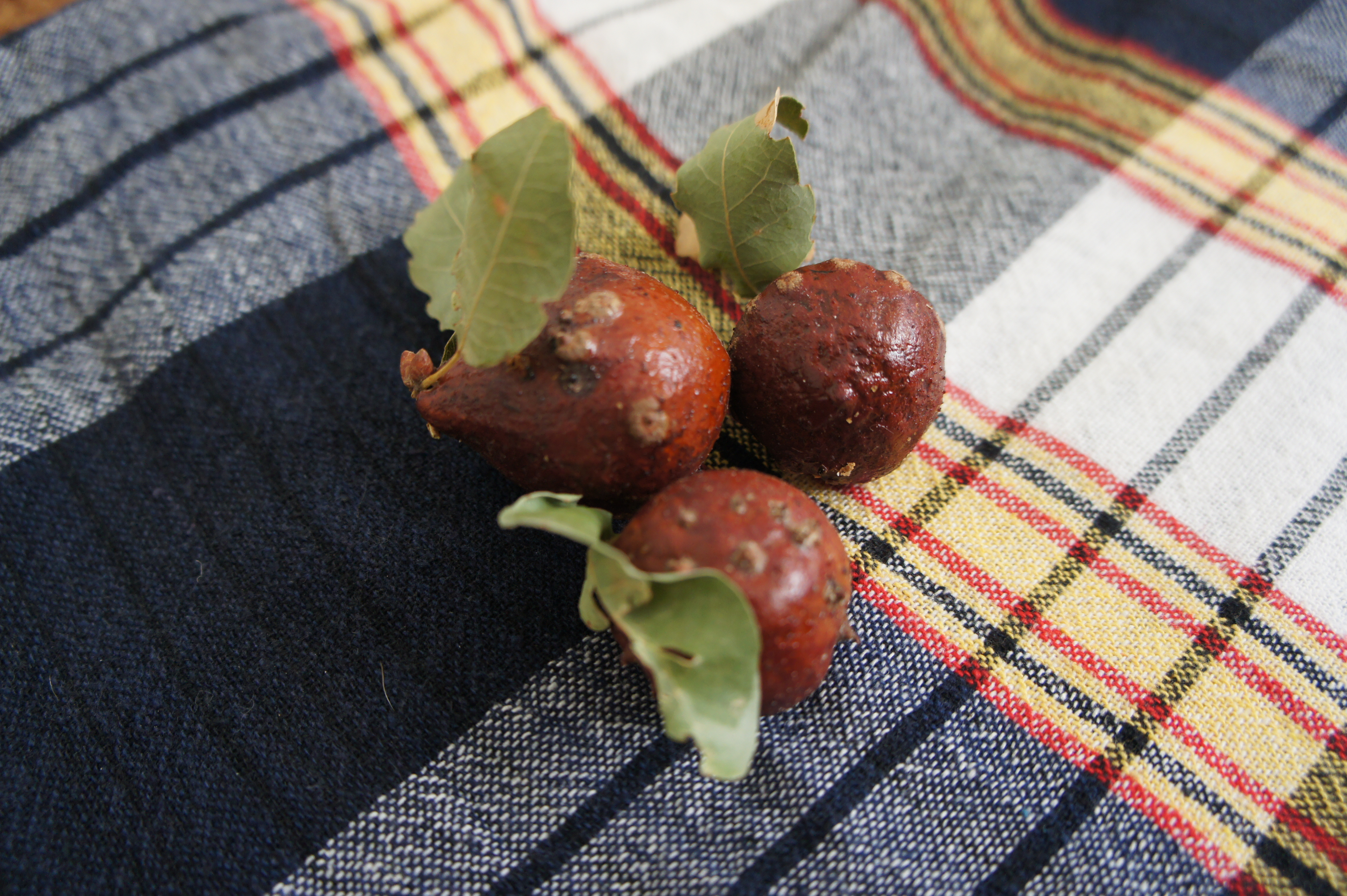 Kurdî: Shekalor (gall-apple), Dêrika Çiyayê Mazî, Mêrdîn.